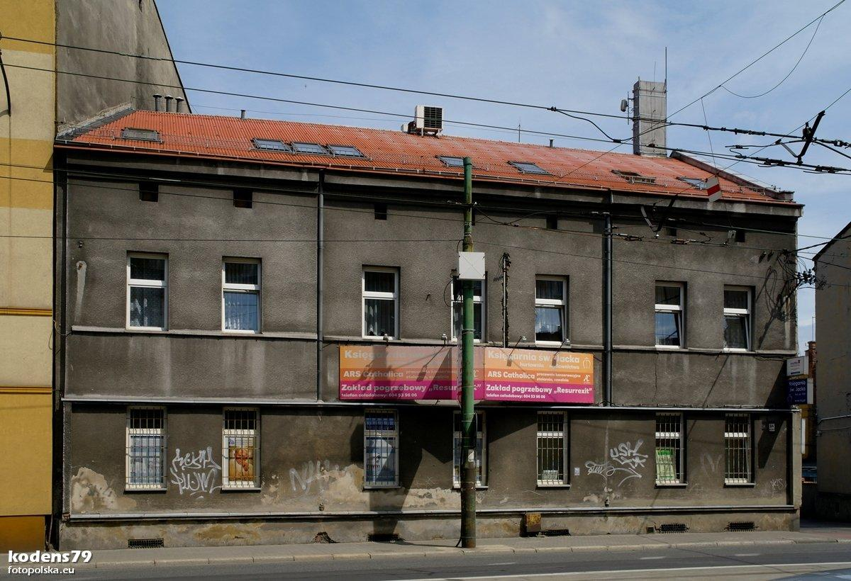 Warszawska 58